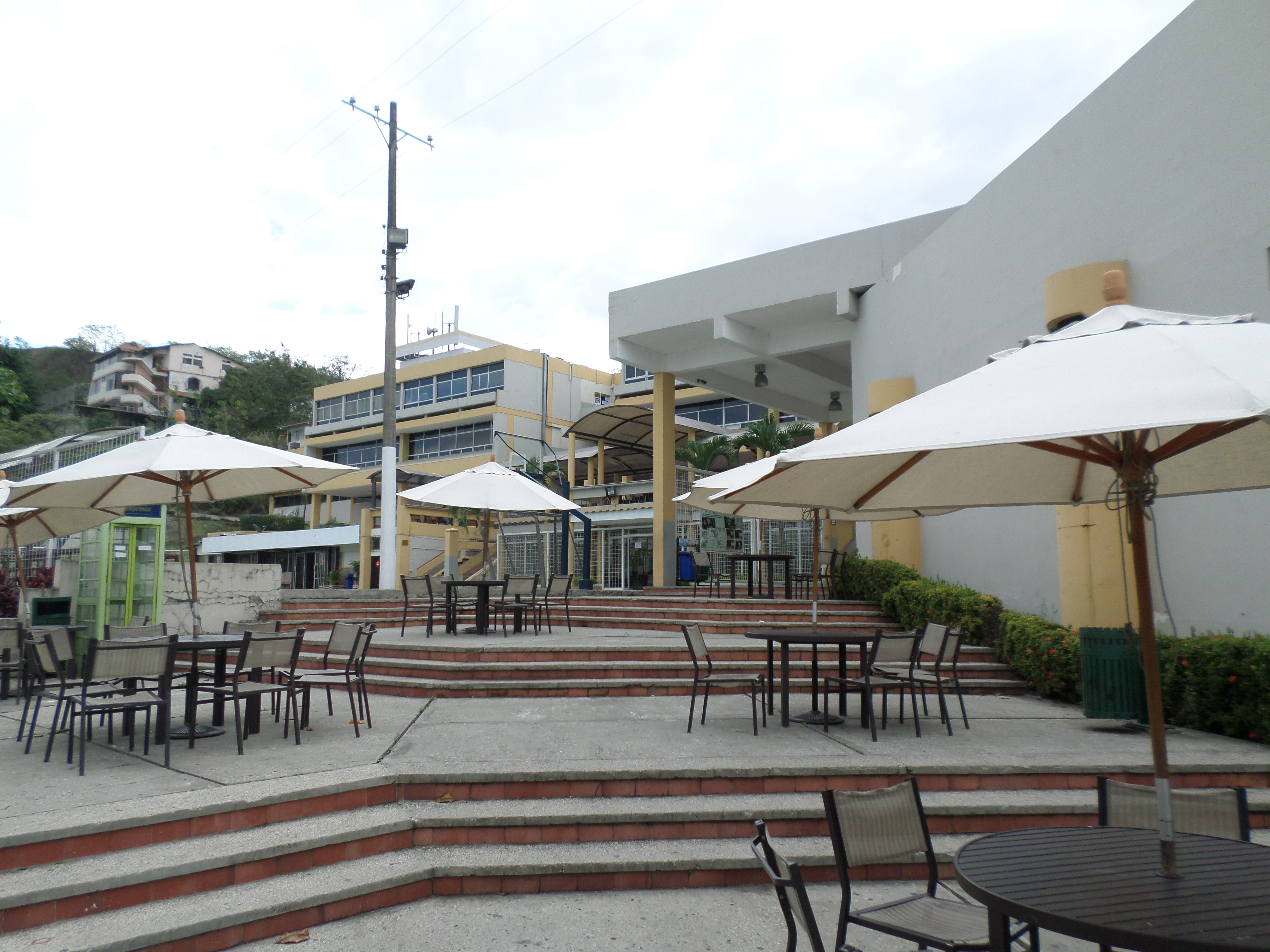 economía